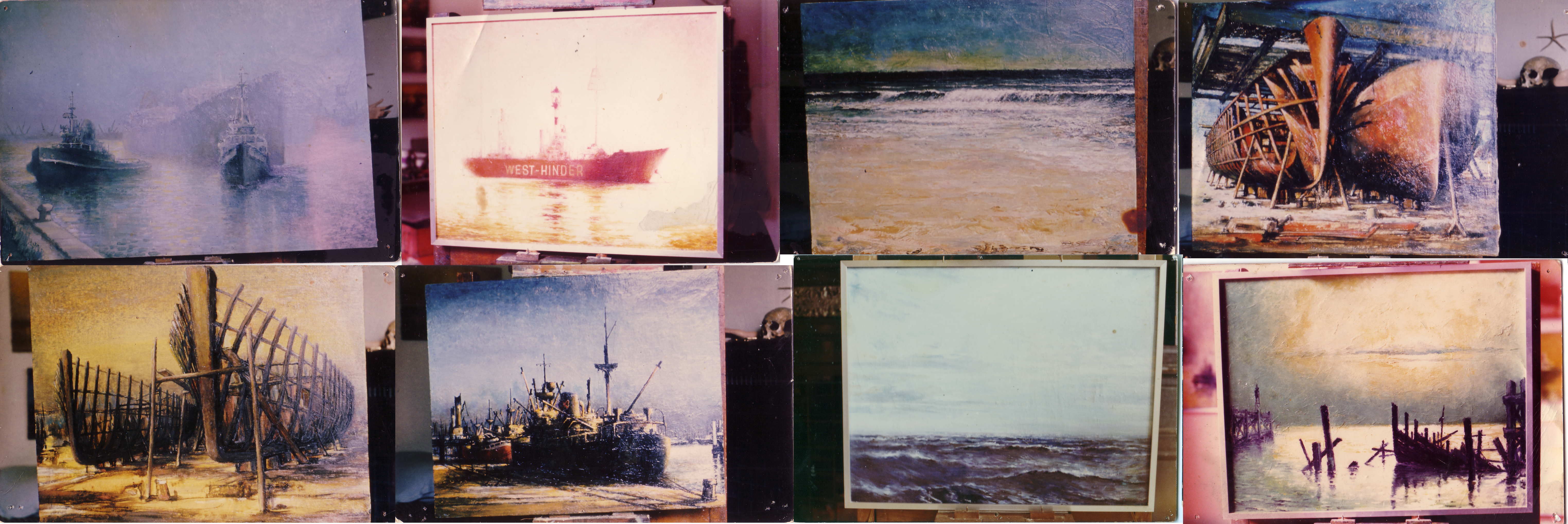 peinture huiles